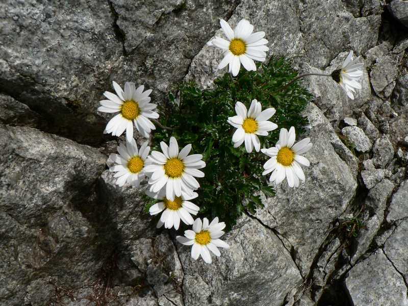 Kopretina alpská